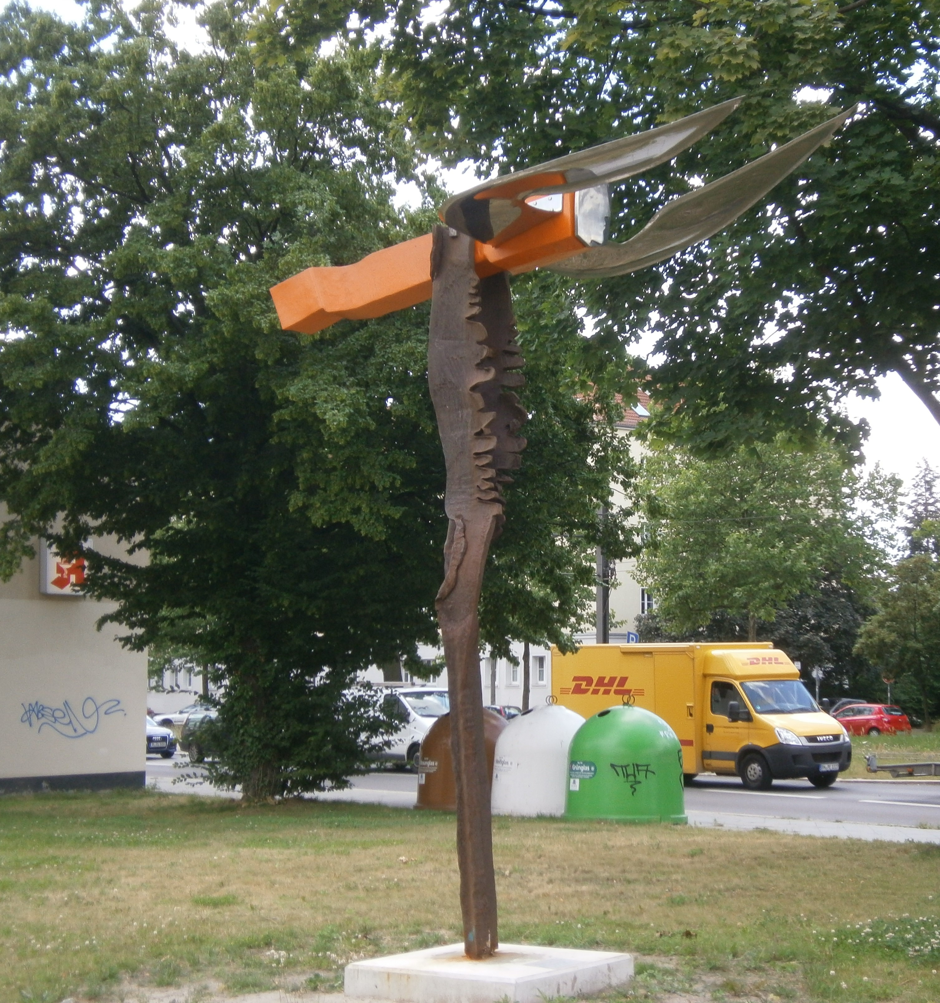 An der Ecke Sterndamm zum Groß-Berliner Damm steht die Metallplastik Fliegender Amboss (1985) von Jan Skuin. Das Windspiel erinnert an Otto Lilienthal, der auch in diesem Ortsteil mit dem Flugplatz Johannisthal gewirkt hat.